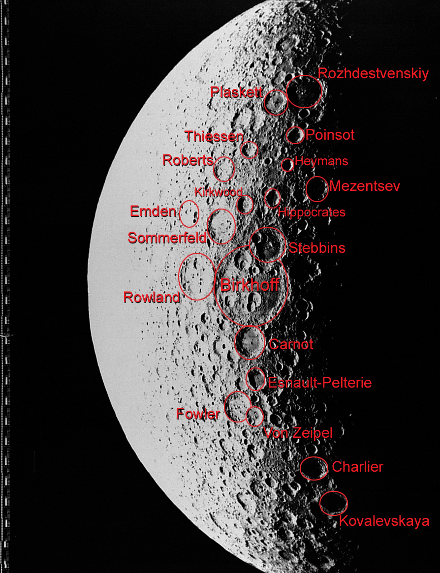 潘索环形山照片